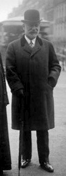 Portrait de Lazare Weiller